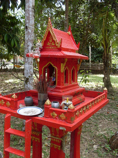 Tayland Ruh Evi.